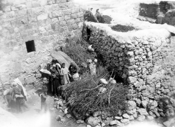 הכפר הערבי צובה בדרך מקרית ענבים לביתר 1935 - תמר אשל